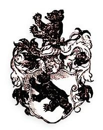 Wappen der Patrizier Bär (Baer) zu Basel